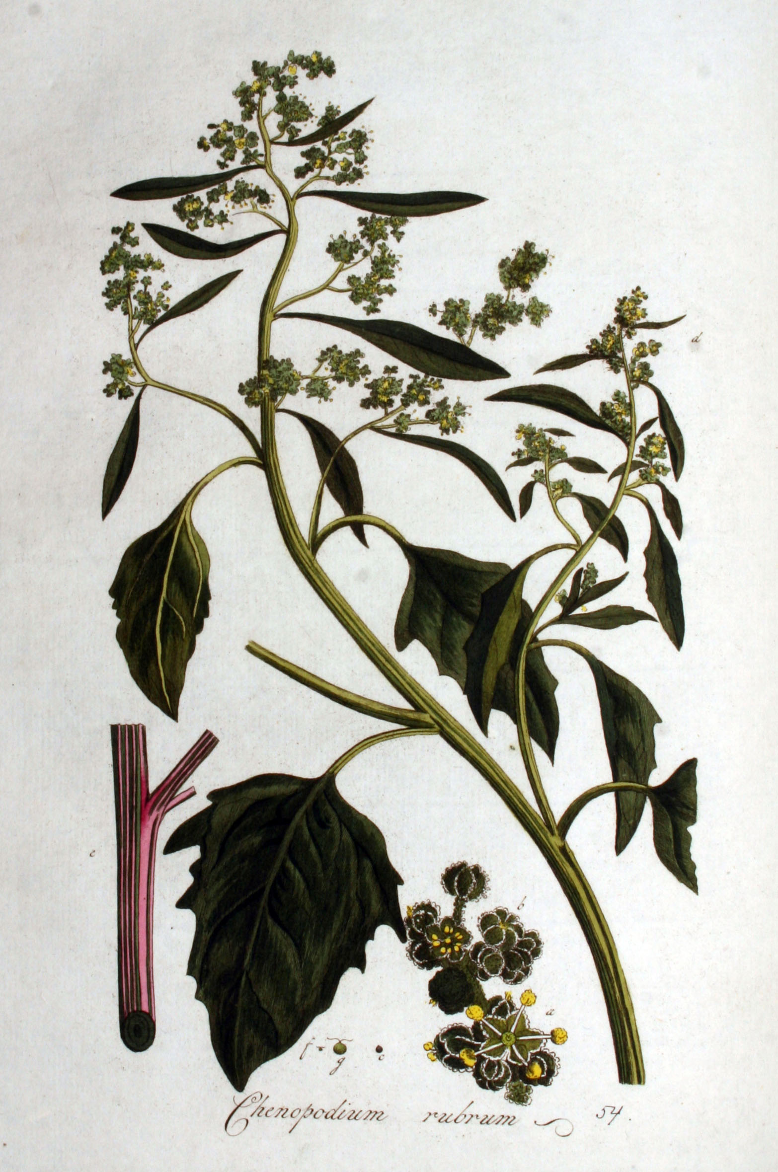 Chenopodium rubrum L. var. humile (Hook.) Gürke